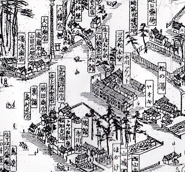 千葉県東葛飾郡市川町の三松館（現在の同県市川市の市川駅北口）付近の略図、1928年